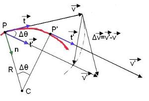 Acceleraţie normală şi tangenţială